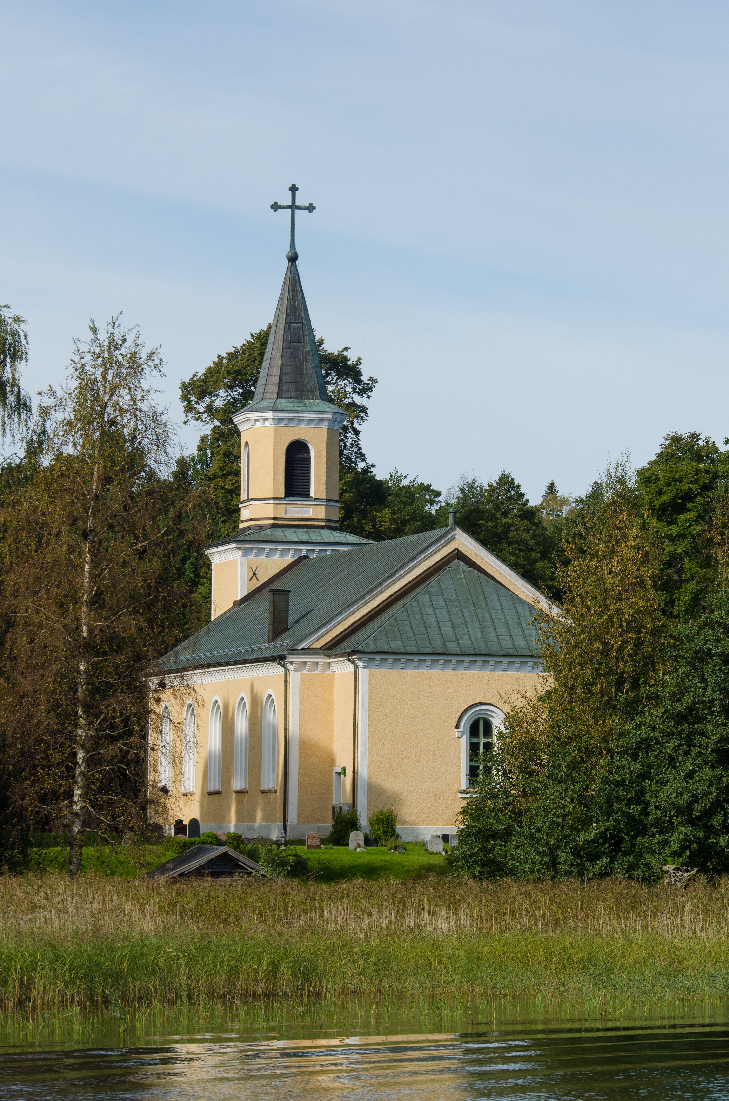 Utö kyrka (church). Utö island, Haninge Municipality, Stockholm archipelago. The church belongs to Dalarö-Ornö-Utö Parish, Church of Sweden. Utö church was built in 1849-50. The architect was Johan Fredrik Åbom. The church was financed by the Utö Grufwebolag (Utö mining company).